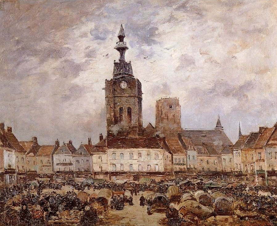 Béthune, place du marché, huile sur toile de Louis Braquaval.